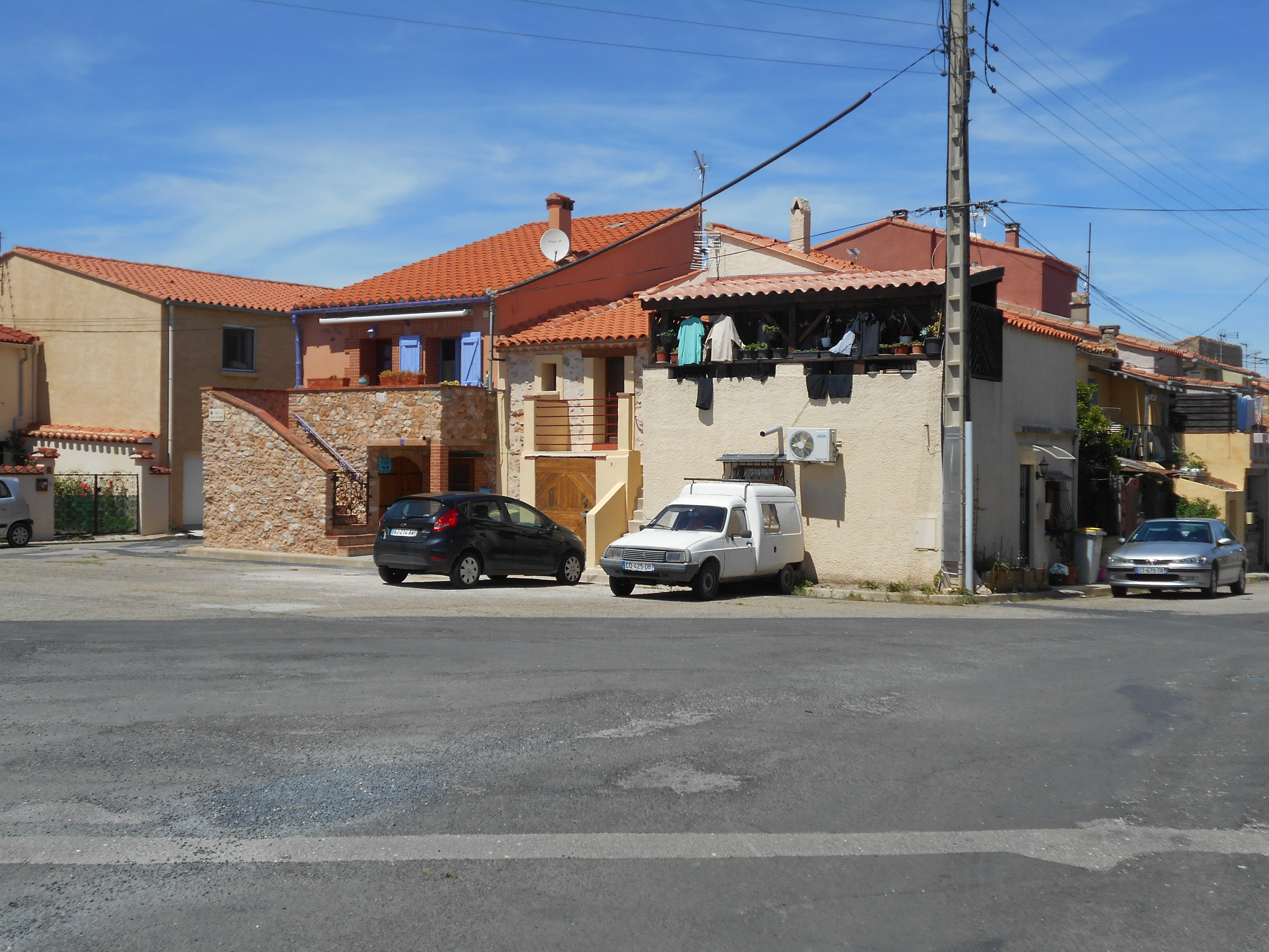 El poble de Santa Coloma de Salses